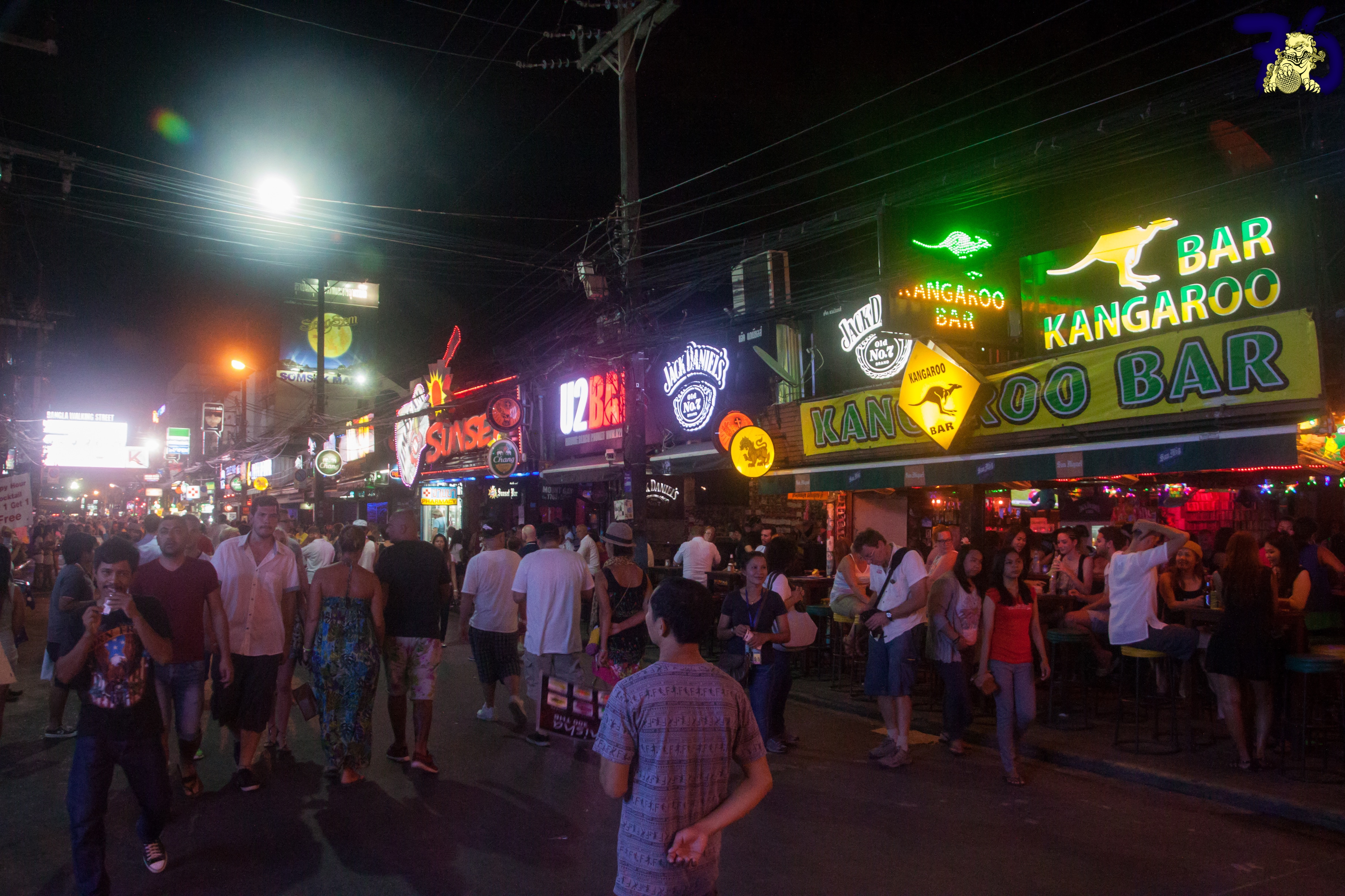 Taken on Bangla Road in Patong, Thailand - 17/02/2015 @ 21:23:06.